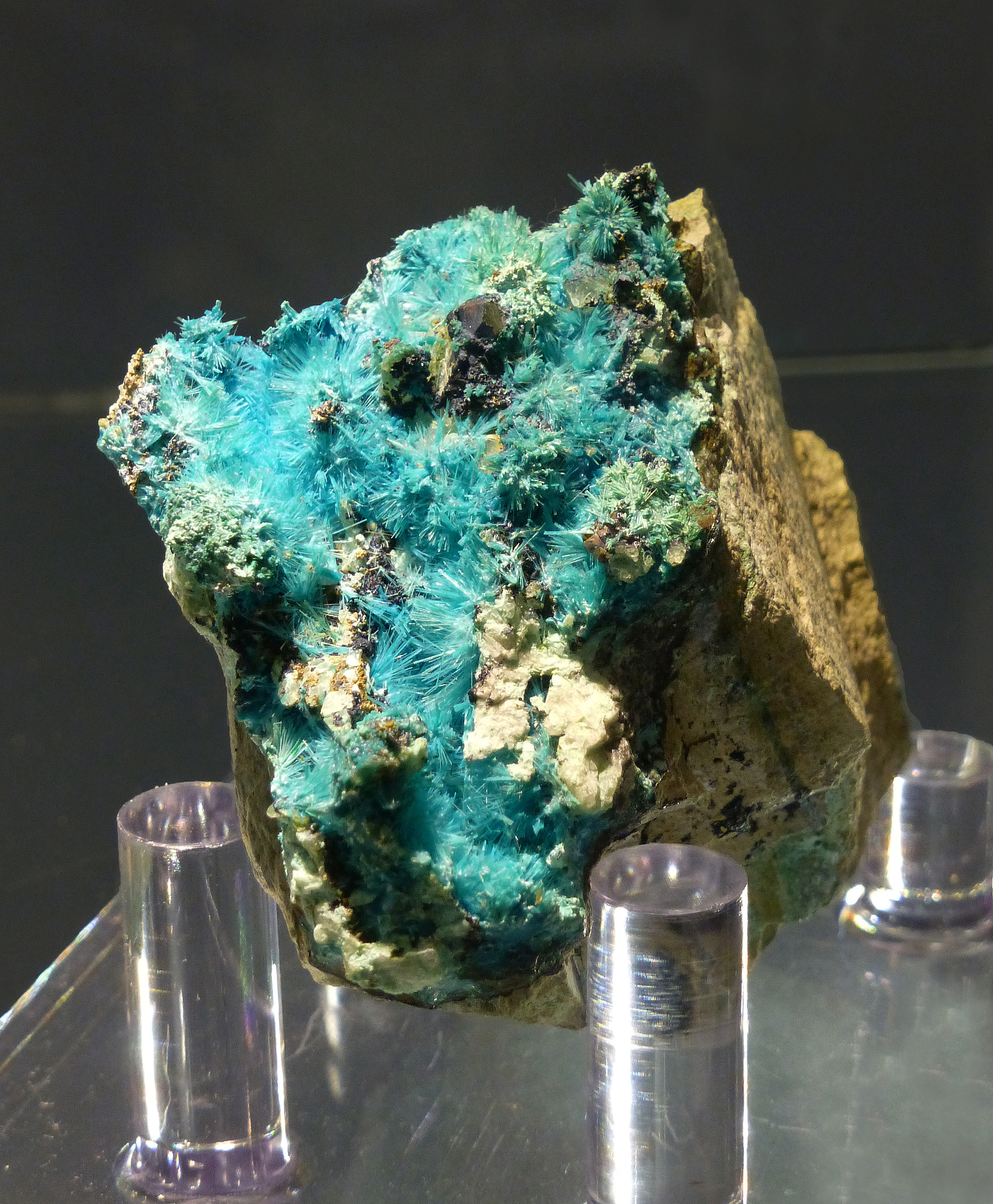 Mcguinessite (Kambove, Katanga, RDC)